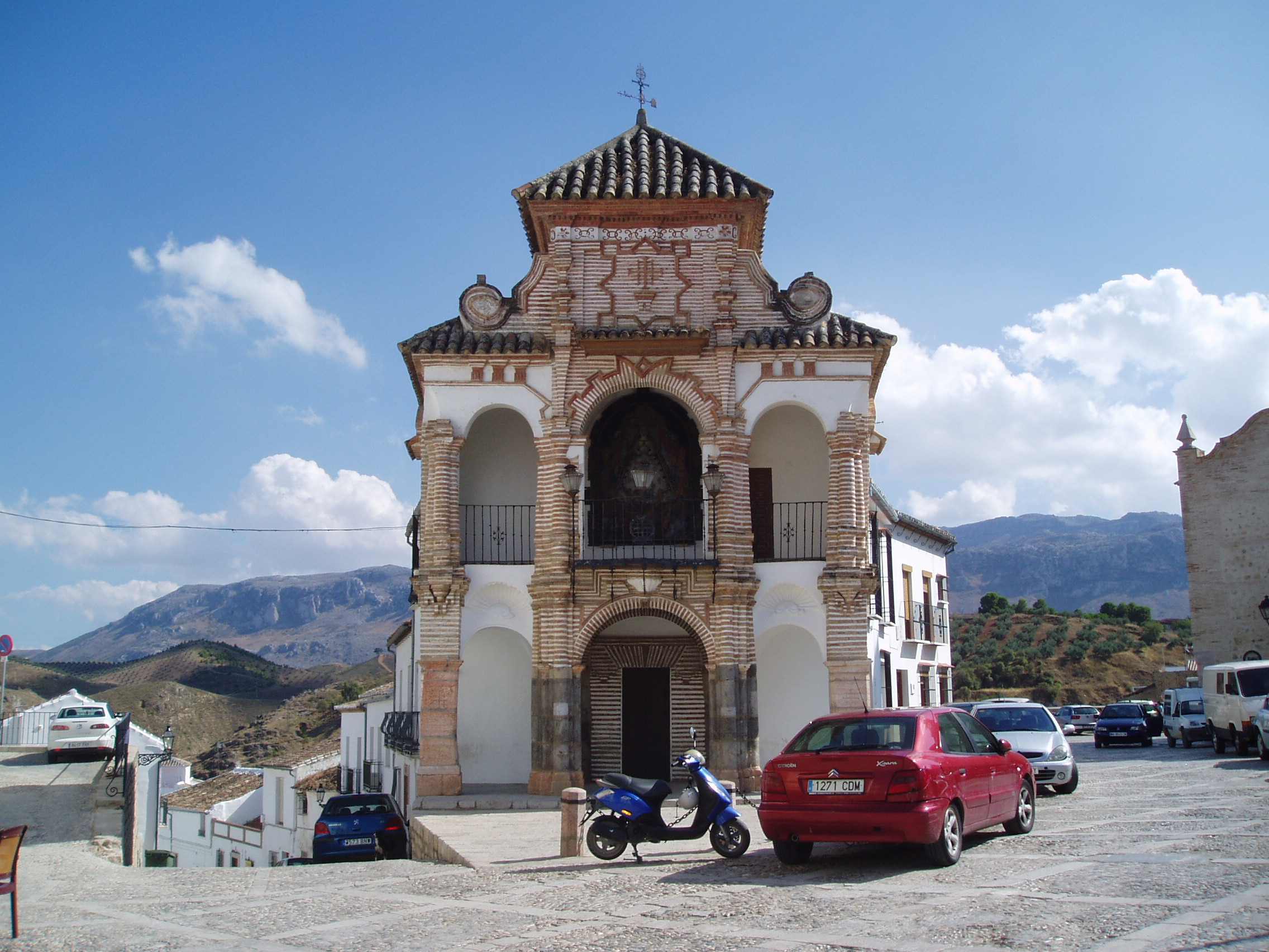 Capilla de la Virgen del Socorro, situada en la localidad malagueña de Antequera. Esta singular capilla callejera, construida en 1715, está dedicada, junto a otras repartidas por toda la ciudad, a difundir la devoción a la Virgen del Socorro, imagen de dolorosa que se venera en la cercana Iglesia de Santa María de Jesús. Su función especifica también se ha relacionado con las posas americanas, en el sentido de servir de parada ritual durante el desarrollo de la Semana Santa. Arquitectónicamente es de una gran originalidad, presentando dos plantas de galerías abiertas y un ático cerrado a manera de cubo coronado por un tejadillo a cuatro aguas. En su fábrica se combina la piedra y el ladrillo vitolado mezclado con las superficies caleadas de blanco.